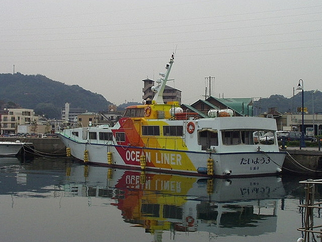 安田産業汽船の｢たいよう3｣ 2006年4月、時津港